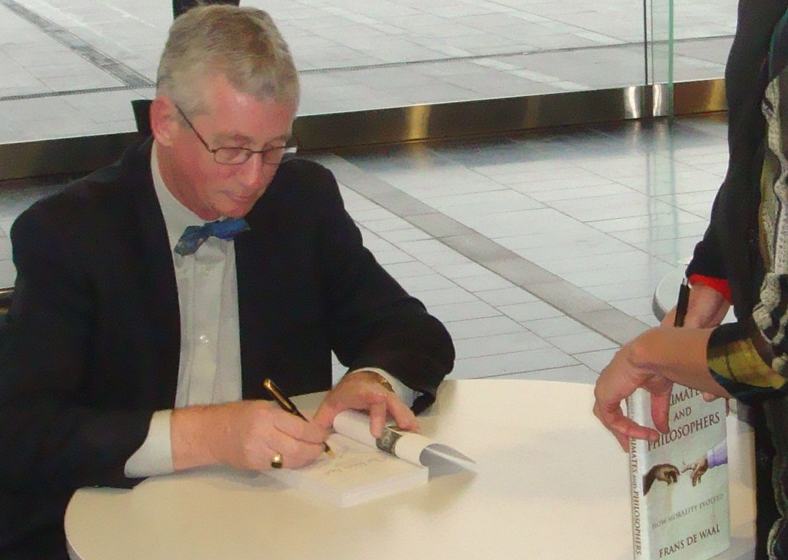 Frans de Waal signing one of his books at the University of Auckland's